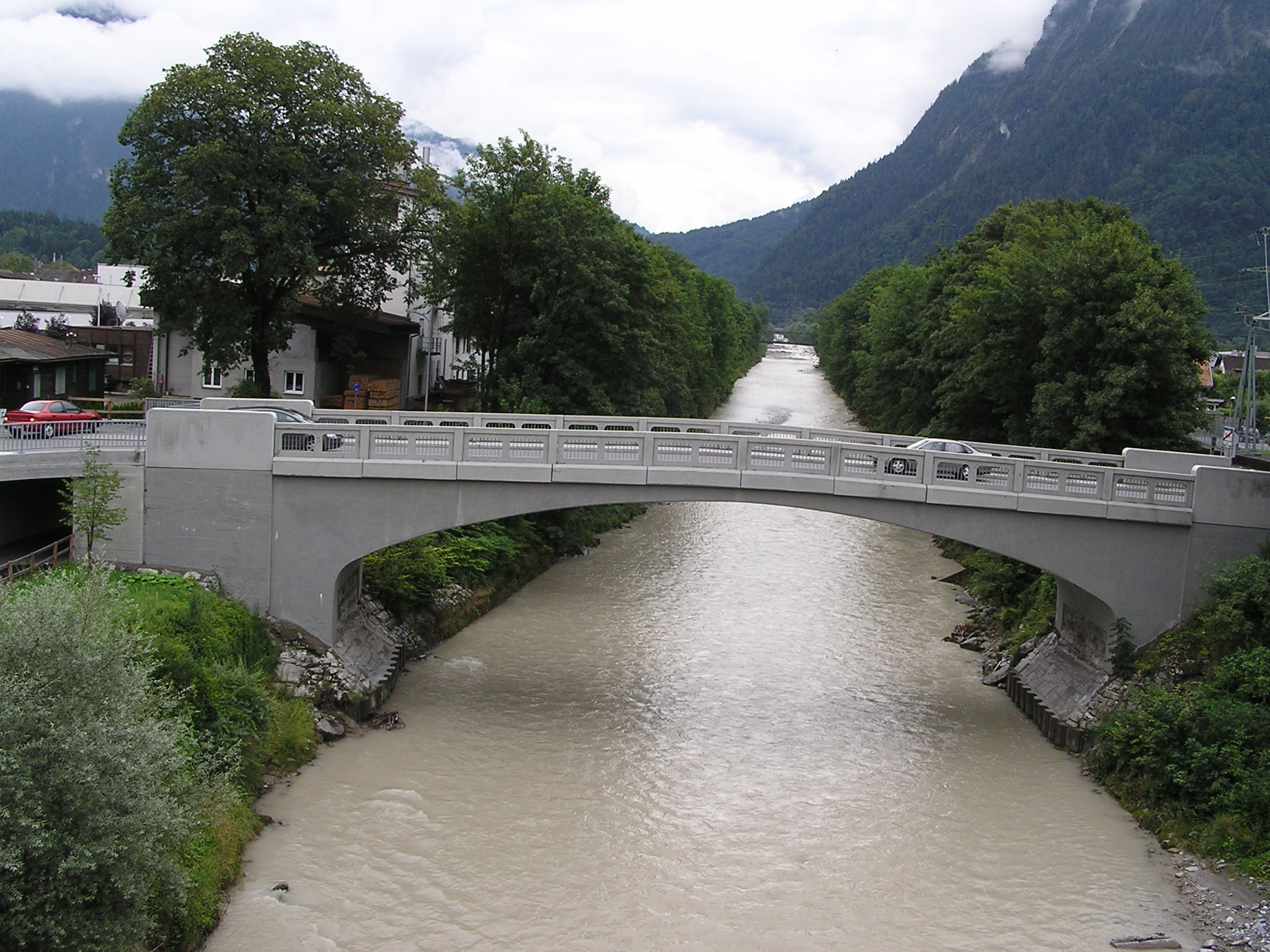 Alte Illbrücke zwischen Bludenz an Bürs Fotograf: Clemens M. Brandstetter, Buers Ort & Datum: 05.08.2006